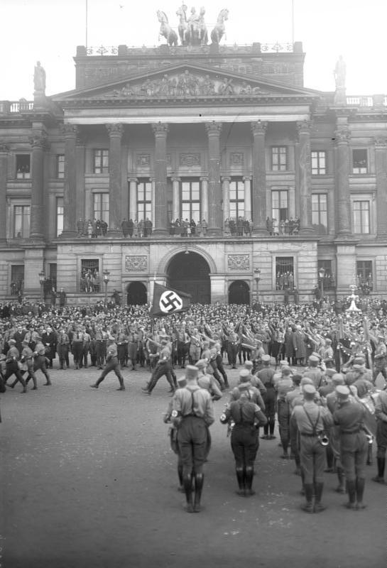 Das grosse Gautreffen der Nationalsozialisten vor ihrem Führer Adolf Hitler in Braunschweig!